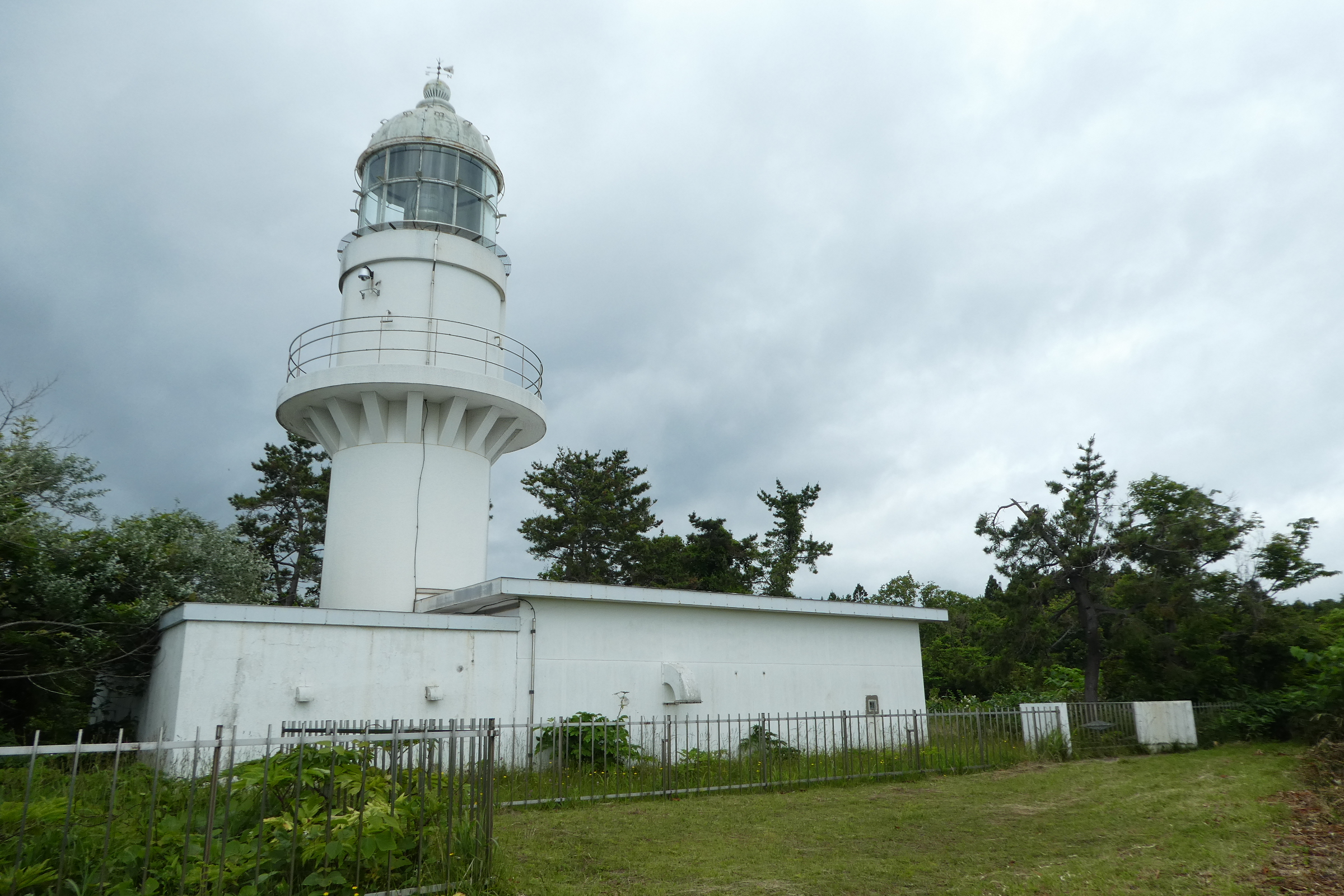 葛登支岬灯台、北海道北斗市